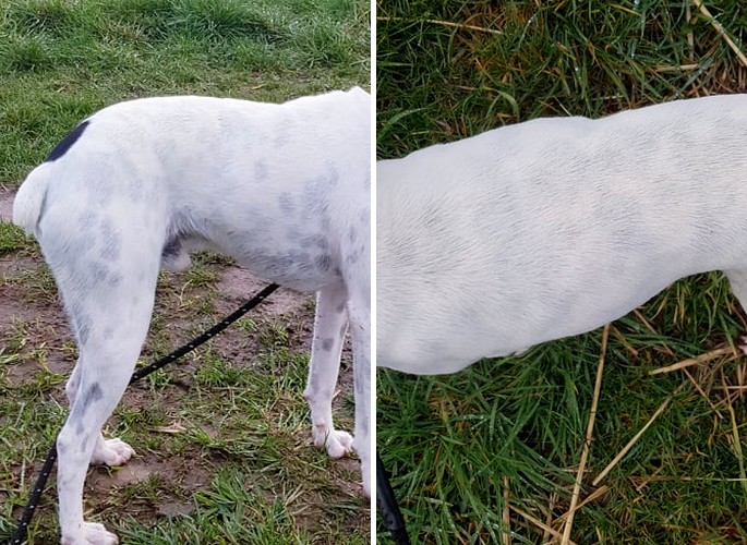 Das Fell eines Bodegueros, erinnert von seiner Länge her fast an das Fell einer Seerobbe aber nicht so dicht und ohne Unterwollen. Die Haare sind fast alle gleichmäßig lang und rein weiß. Durch die fehlende Unterwolle sieht man auch die schwarzen Flecken die sich auf seiner Haut befinden. Diese Hautflecken werden im Winter meist sehr viel heller.